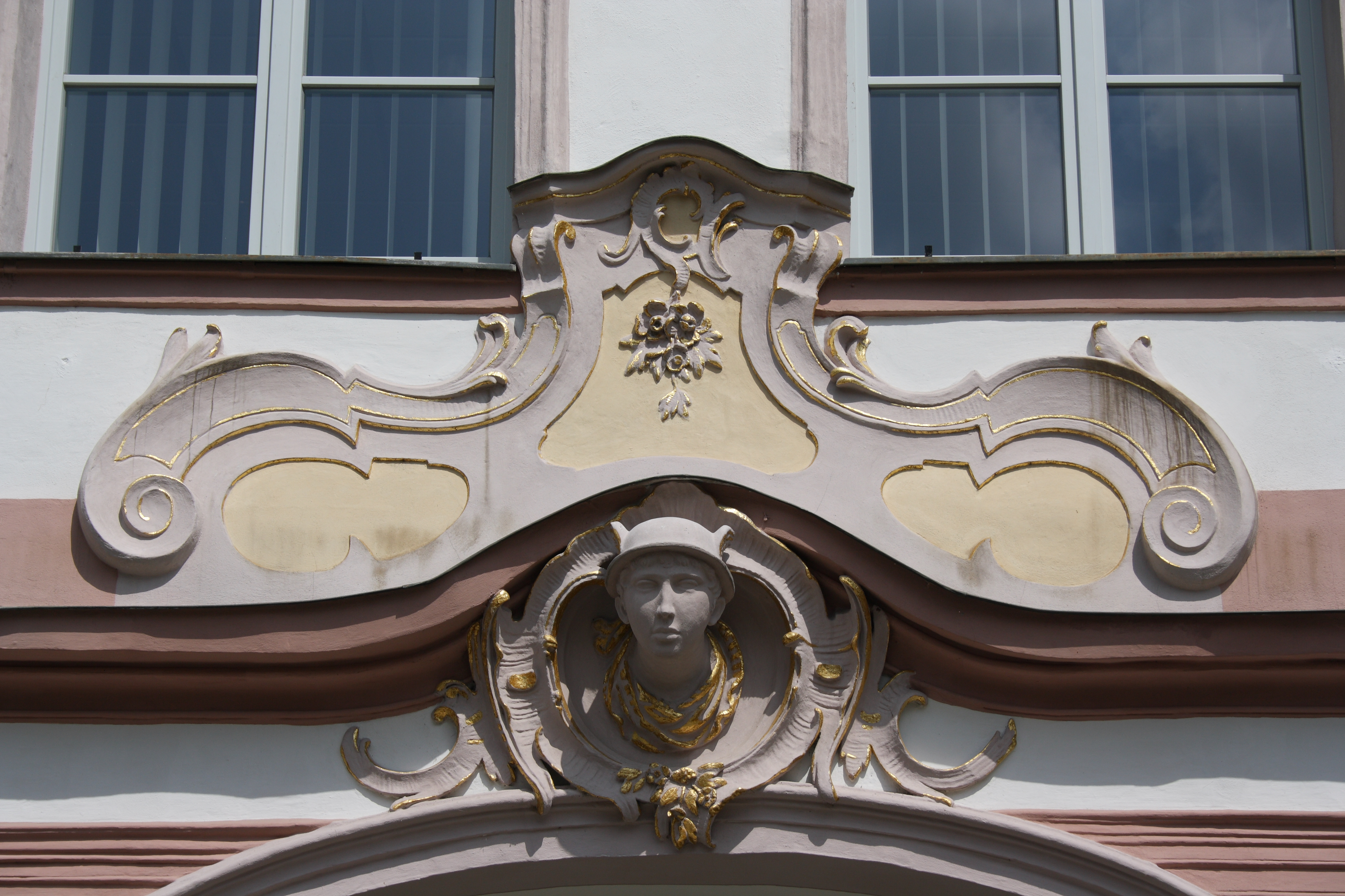 Brentano-Haus in Günzburg (Bayern), Marktplatz 8; 1747 erbaut, Merkurkopf von 1939